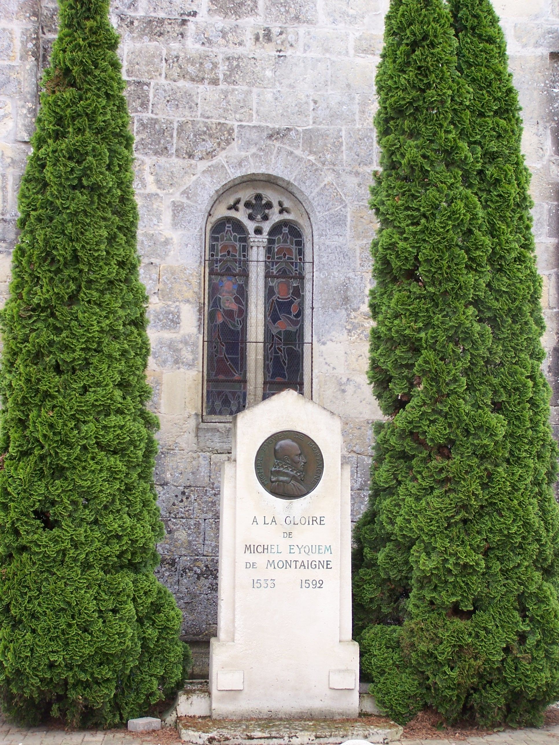 Stèle à la mémoire de Montaigne à Saint-Michel-de-Montaigne, Dordogne, France